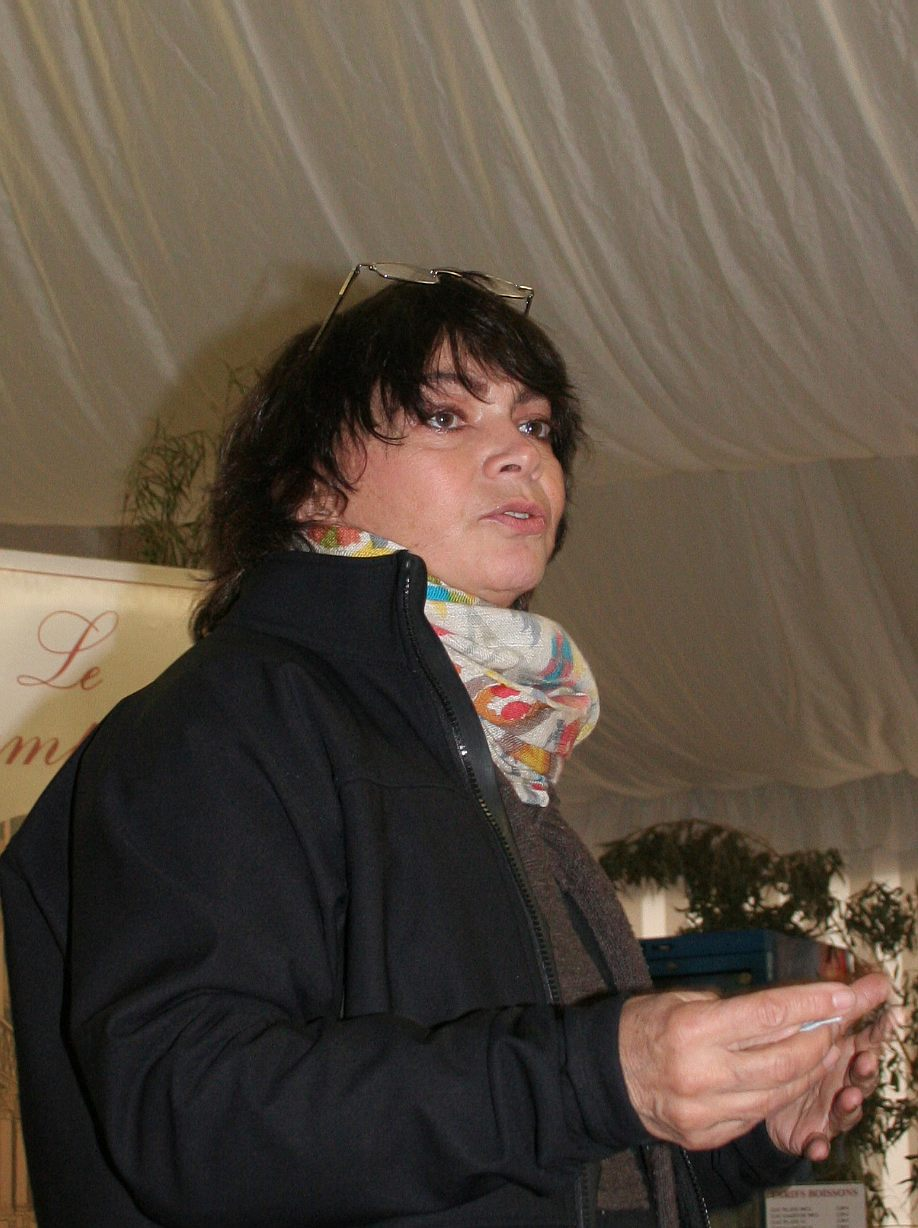 Jocelyne Saab